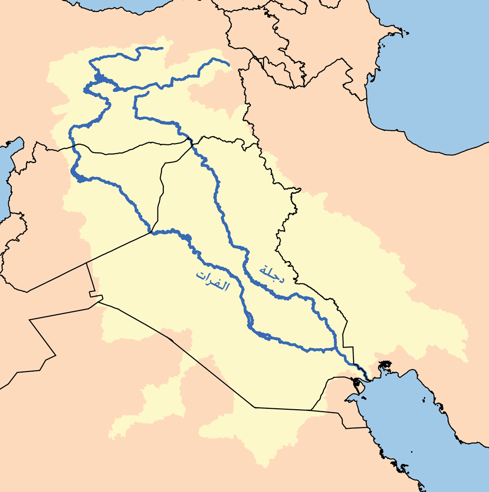 حوض نهريّ دجلة والفرات في منطقة الشرق الأوسط